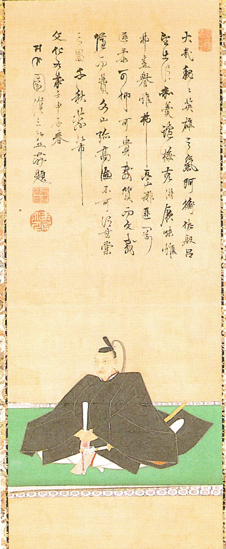 井伊直幸の肖像。